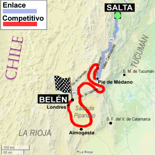 Dakar Rally 2018. Mapa de Etapa 10. Salta-Belén.